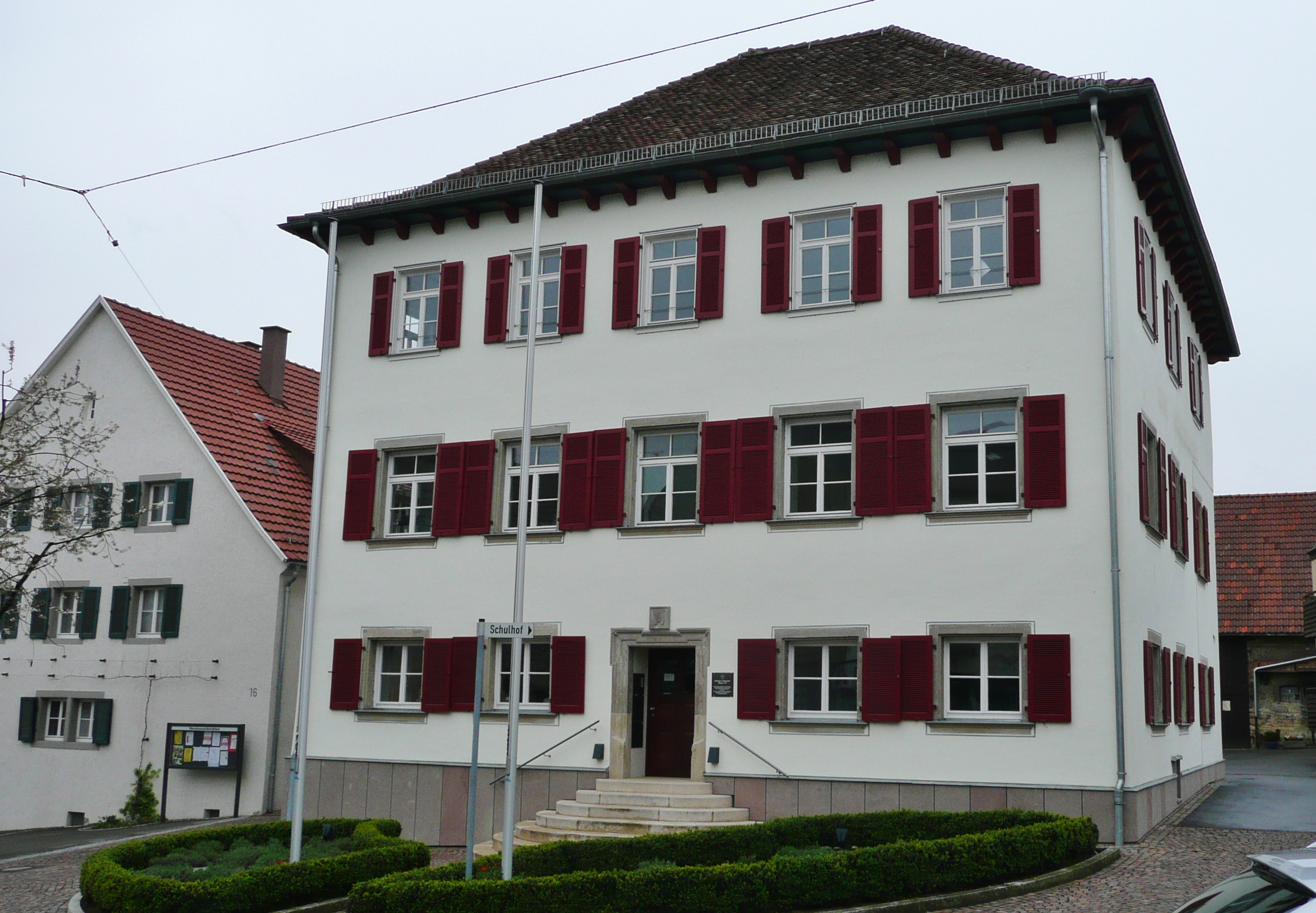 Oeffinger Schlössle, erbaut 1717, ehemaliger Besitz der Herren von Neuhausen